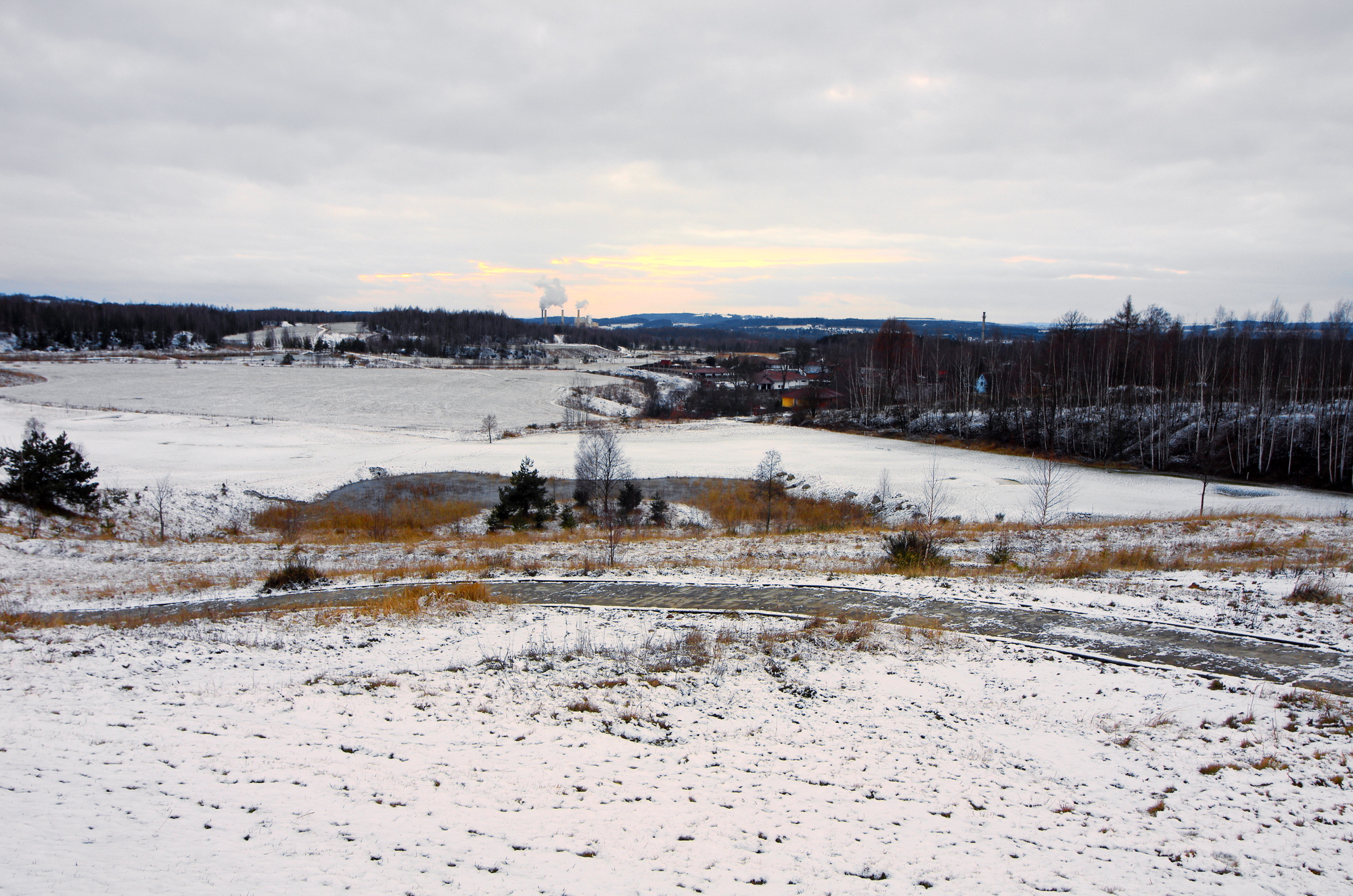 rekultivovaná výsypka Silvestr, Dolní Rychnov, okres Sokolov